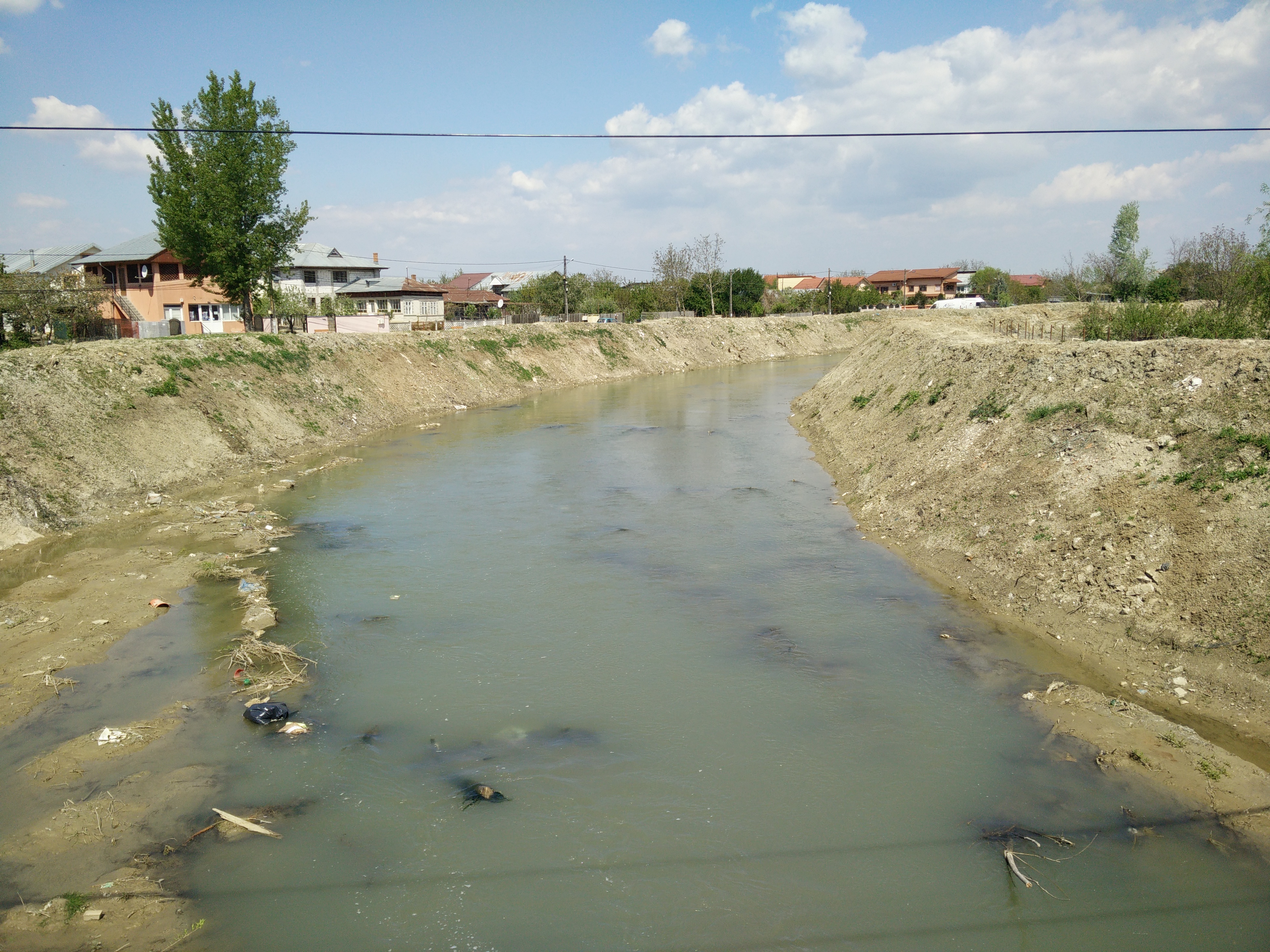 Vedere spre amonte a râului Ciorogârla